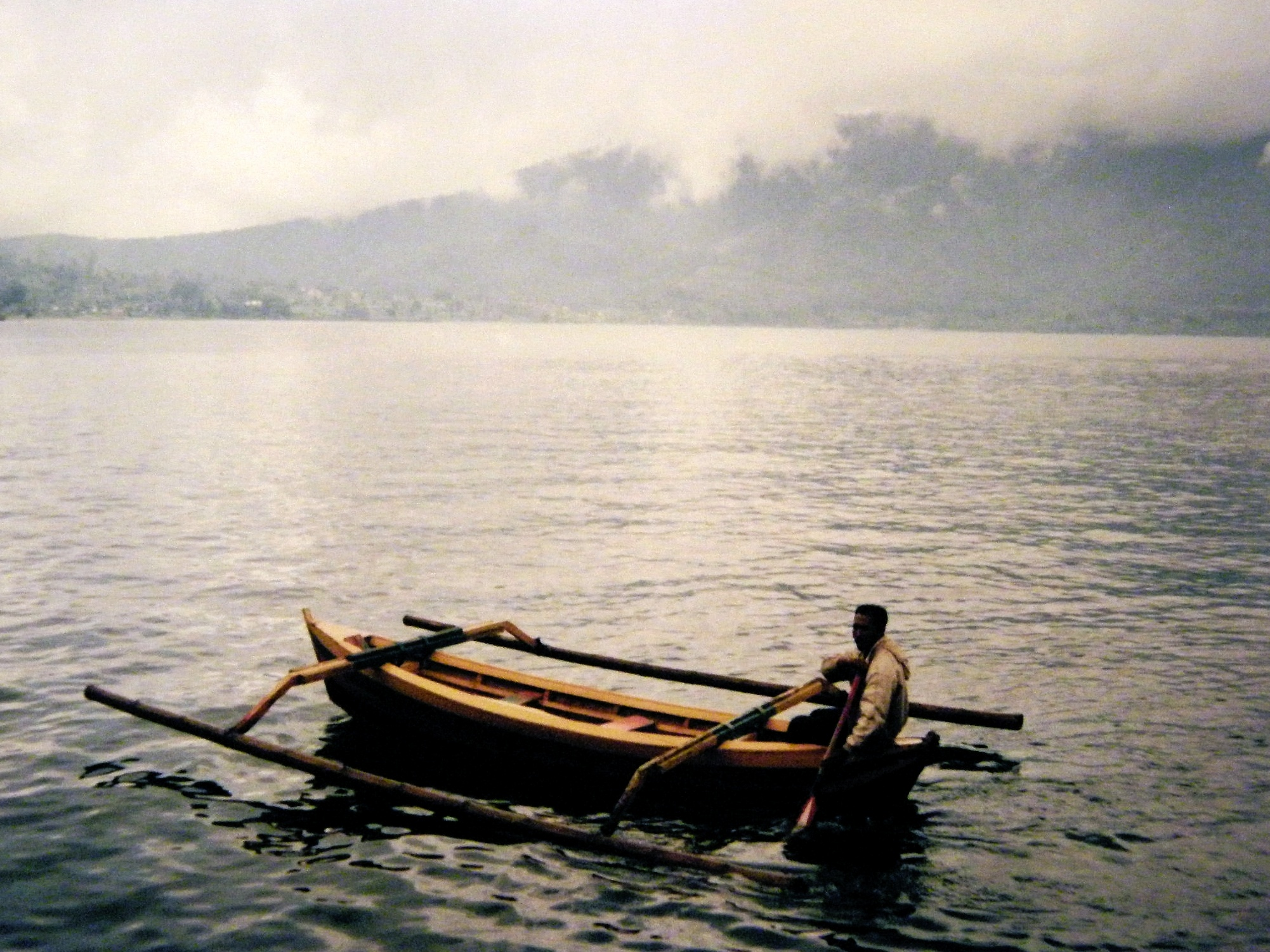 Desa Kintamani Bali-Indonesia インドネシア バリ島 キンタマーニ レストラン February 1991